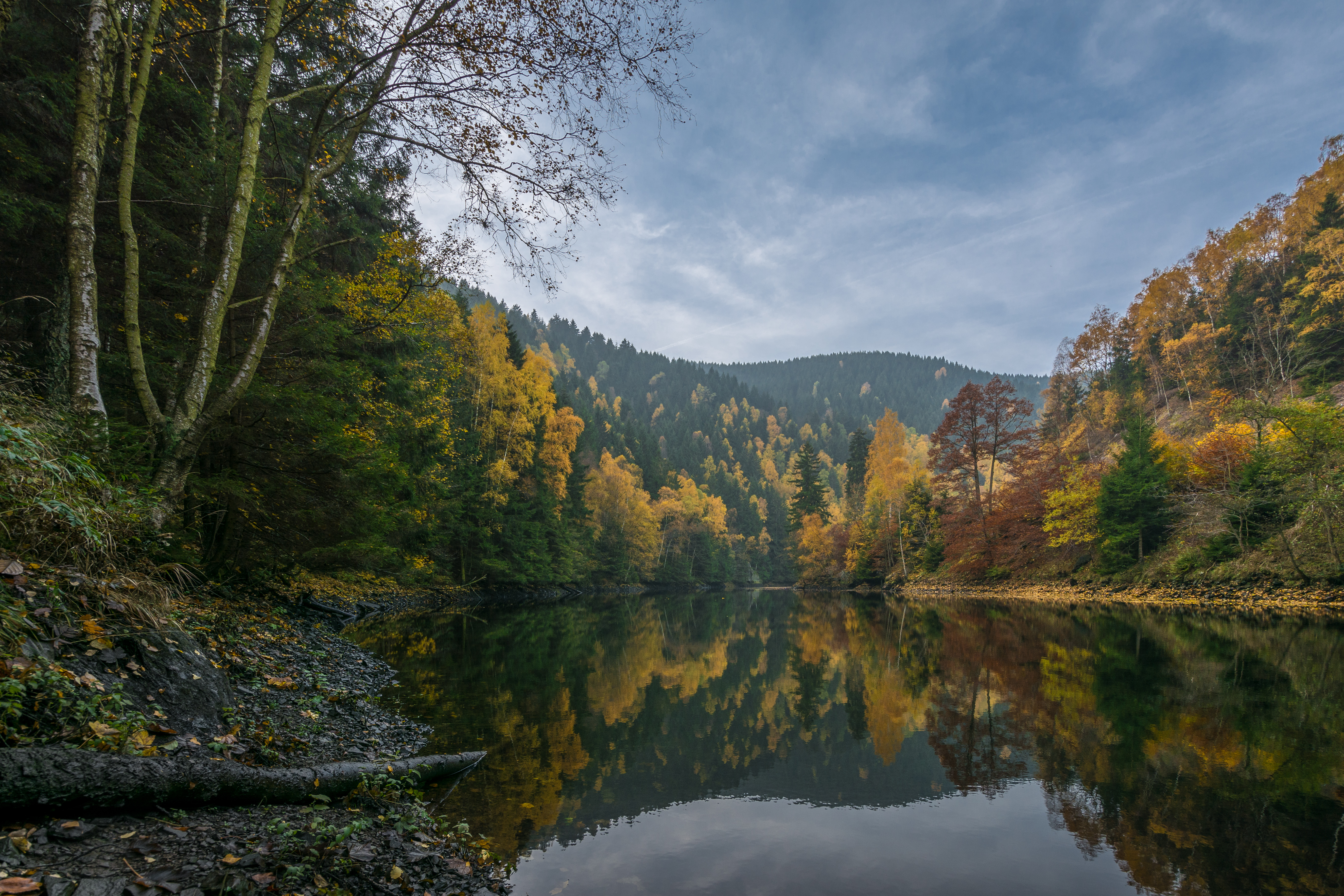 Spiegelungen im Okerstau, Harz.